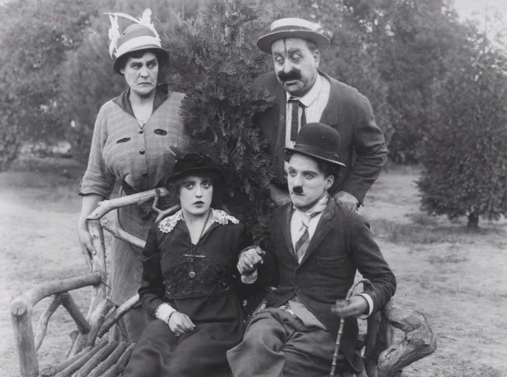 fotografía de la película Getting Acquainted de 1914.